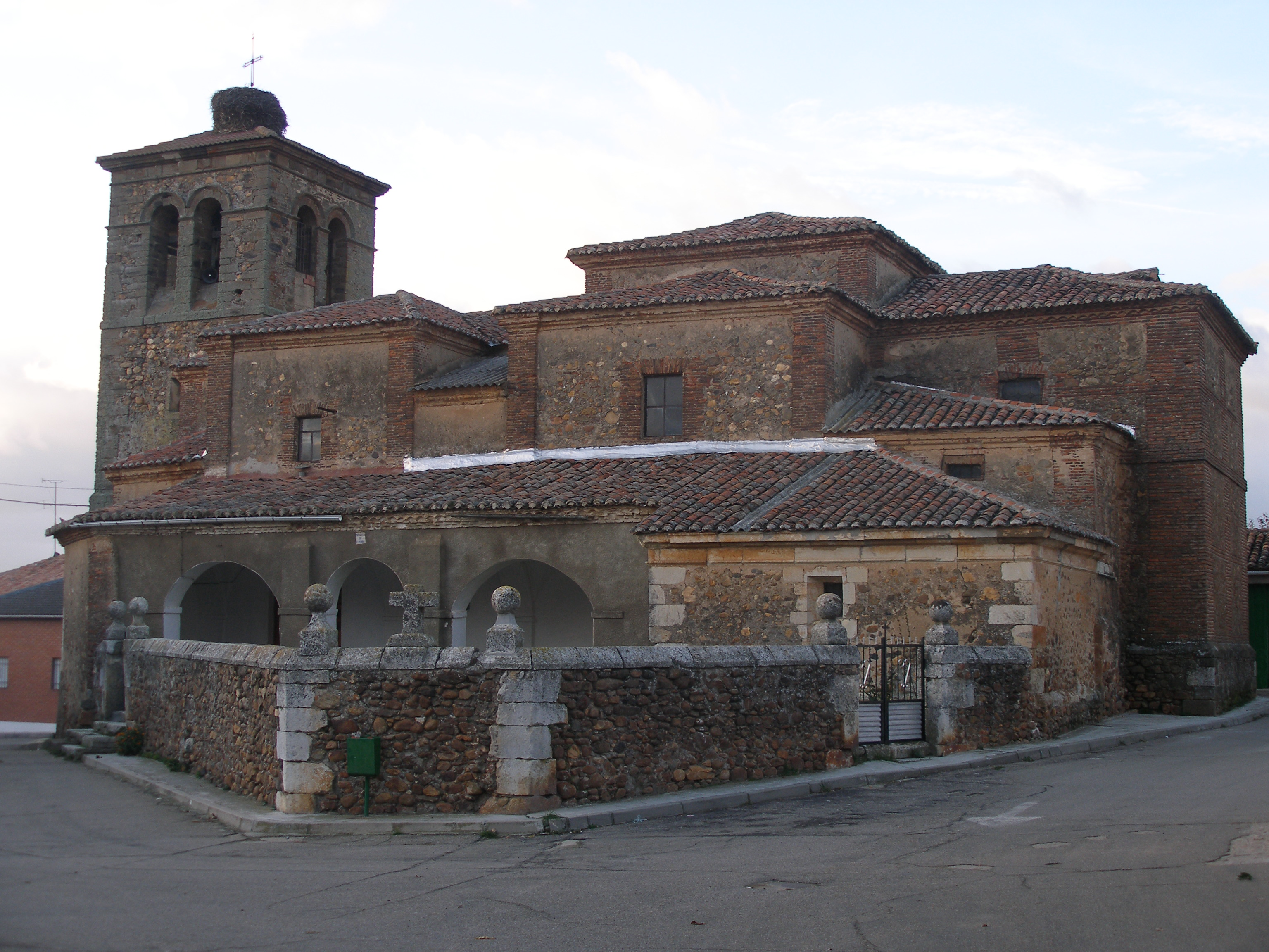 Iglesia San Pedro de Pino del Río (Palencia, Castilla y León).